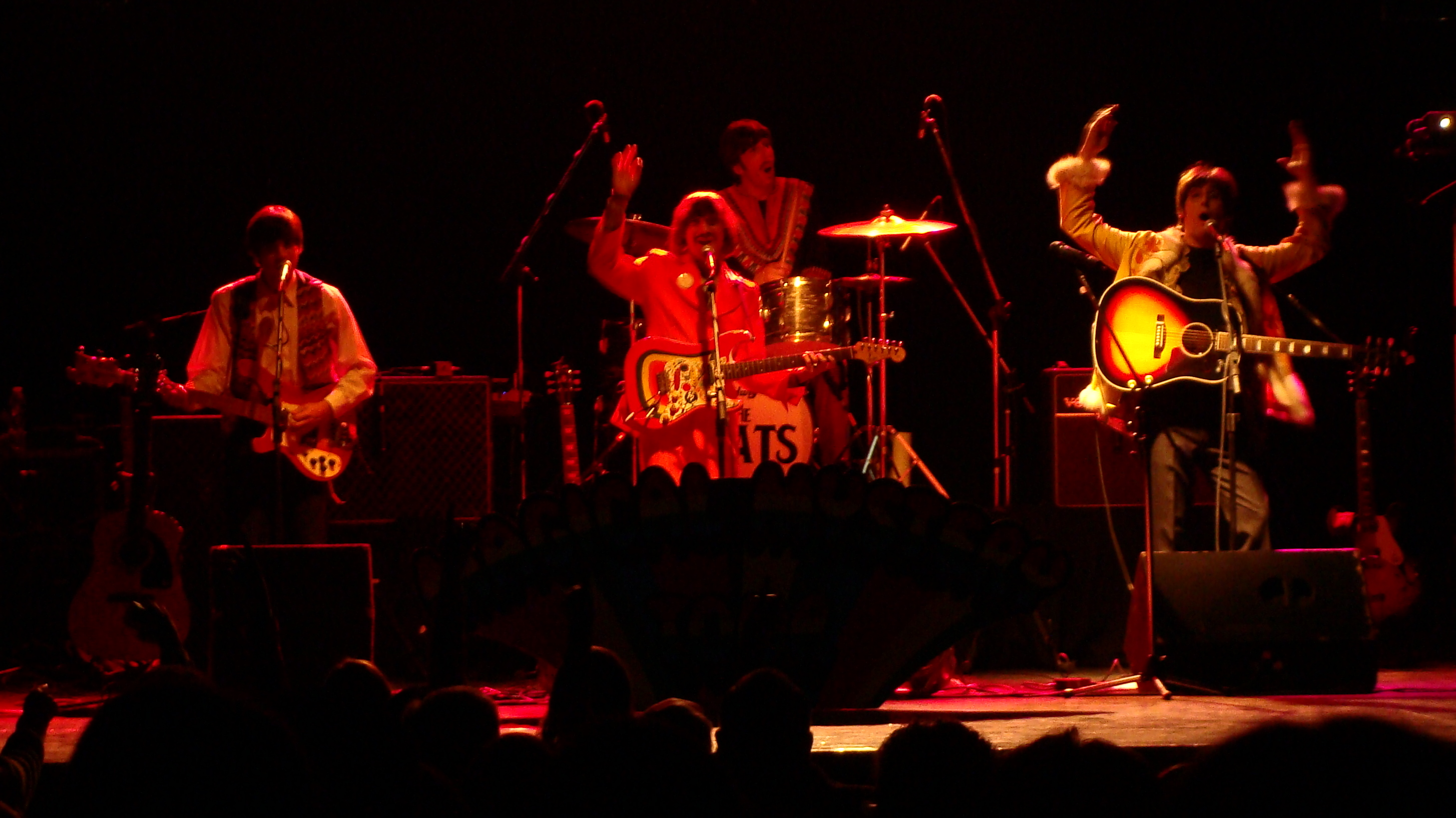 Fotografía tomada en un concierto de The Beats en que aparecen todos los integrantes de la banda